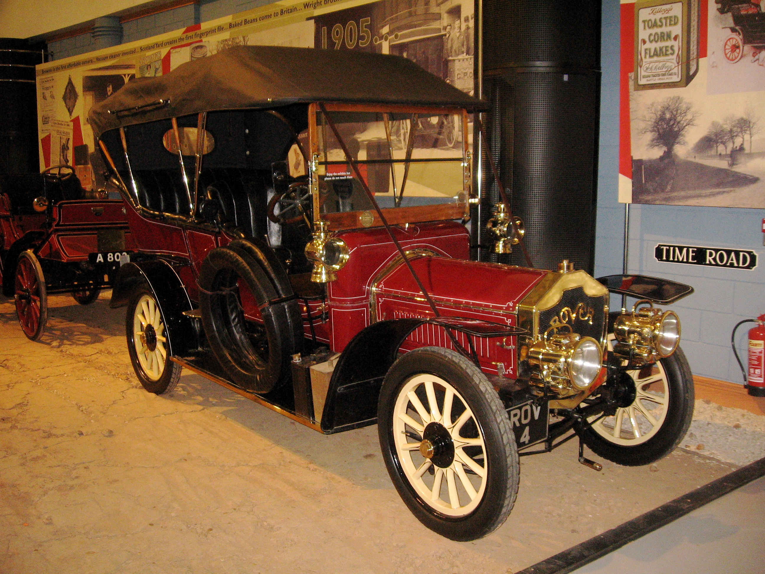 A bit delicate looking for me...eep.